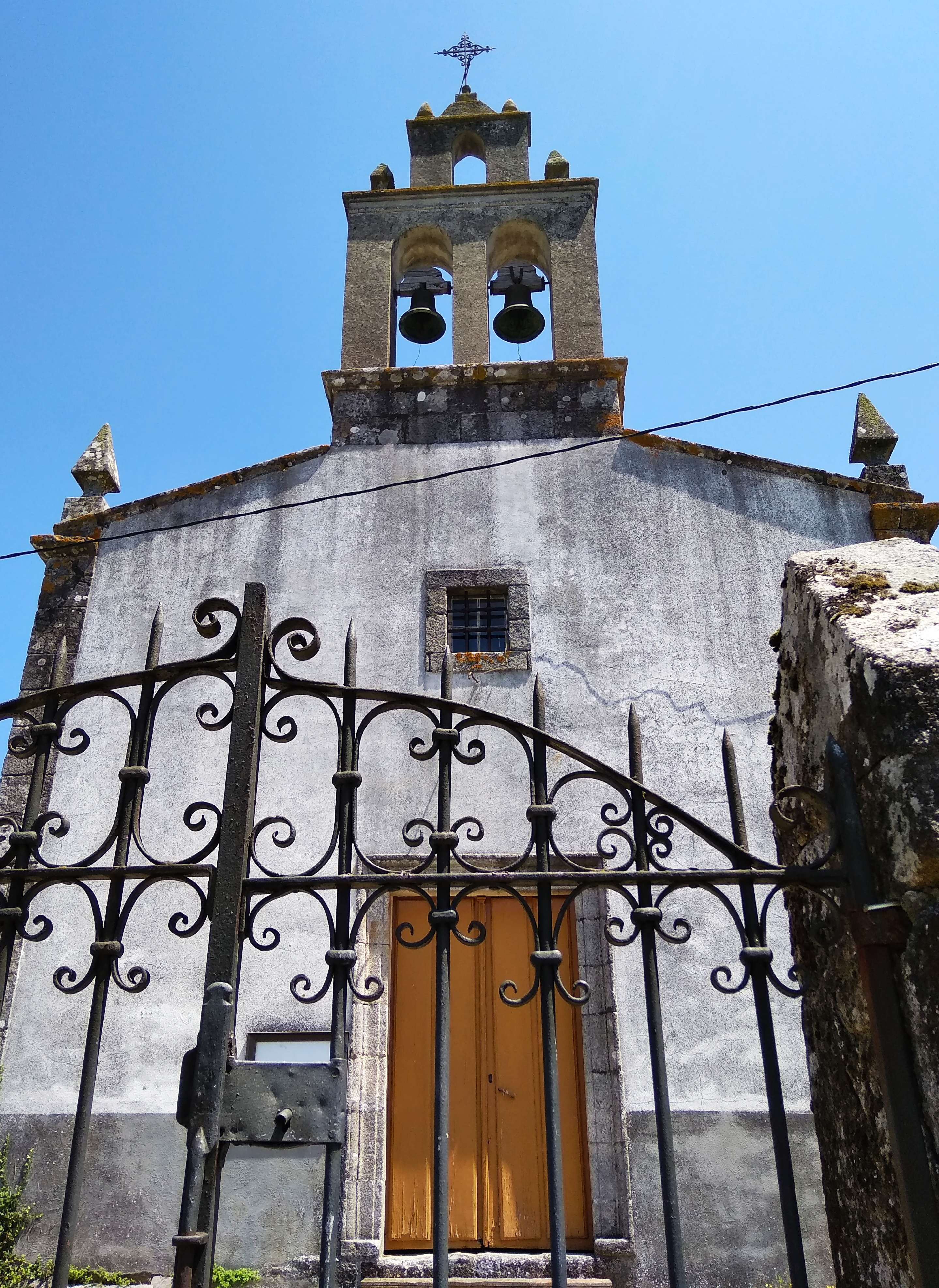 Porta principal da Igrexa de San Bartolomeu na parroquia lucense de Vilalpape (Bóveda)